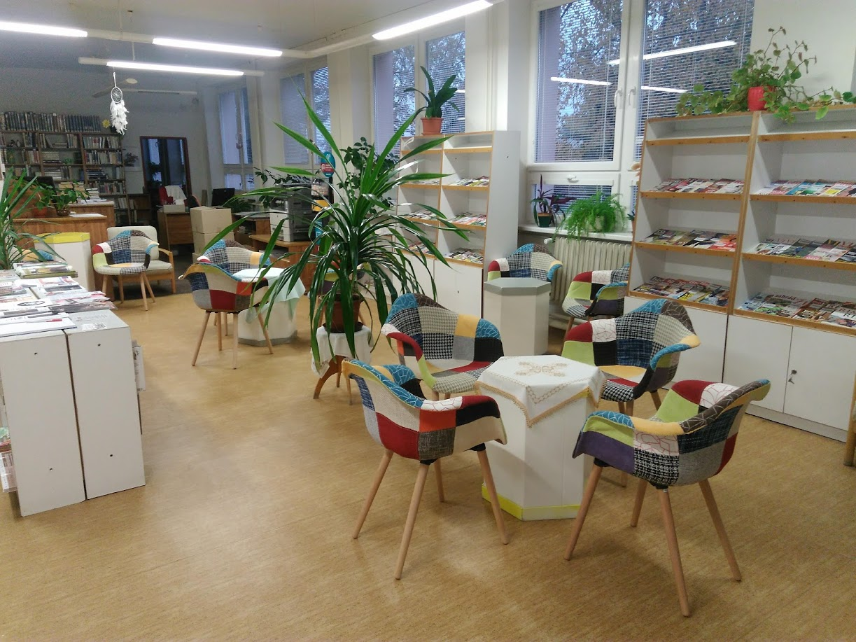 Pohled do interiéru pobočky KKKV Lidická.